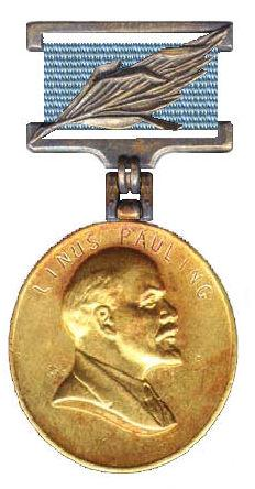 Medaille van de medaille van de Leninprijswinnaars.